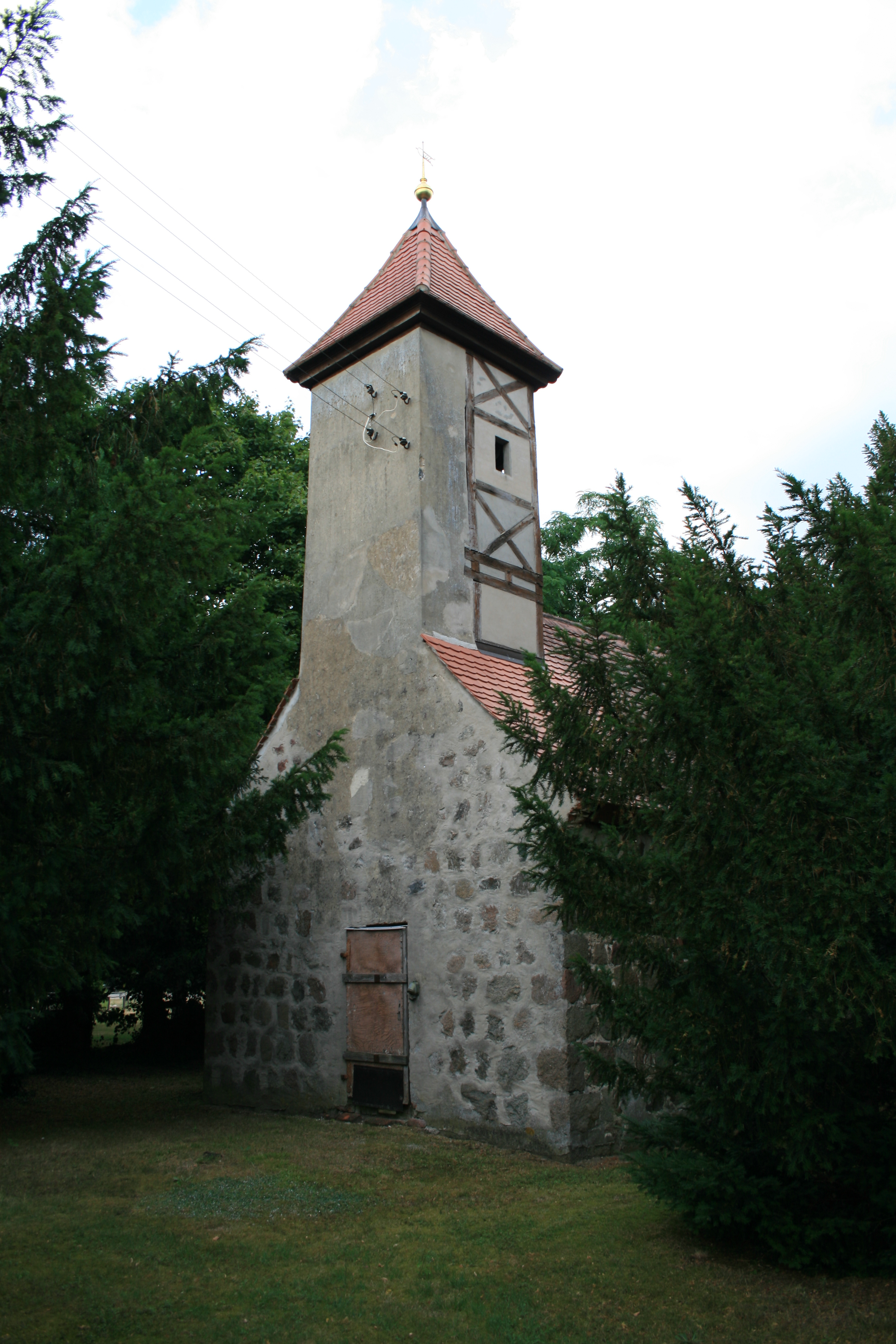 Südwestansicht der Kirche von Lüttgenziatz